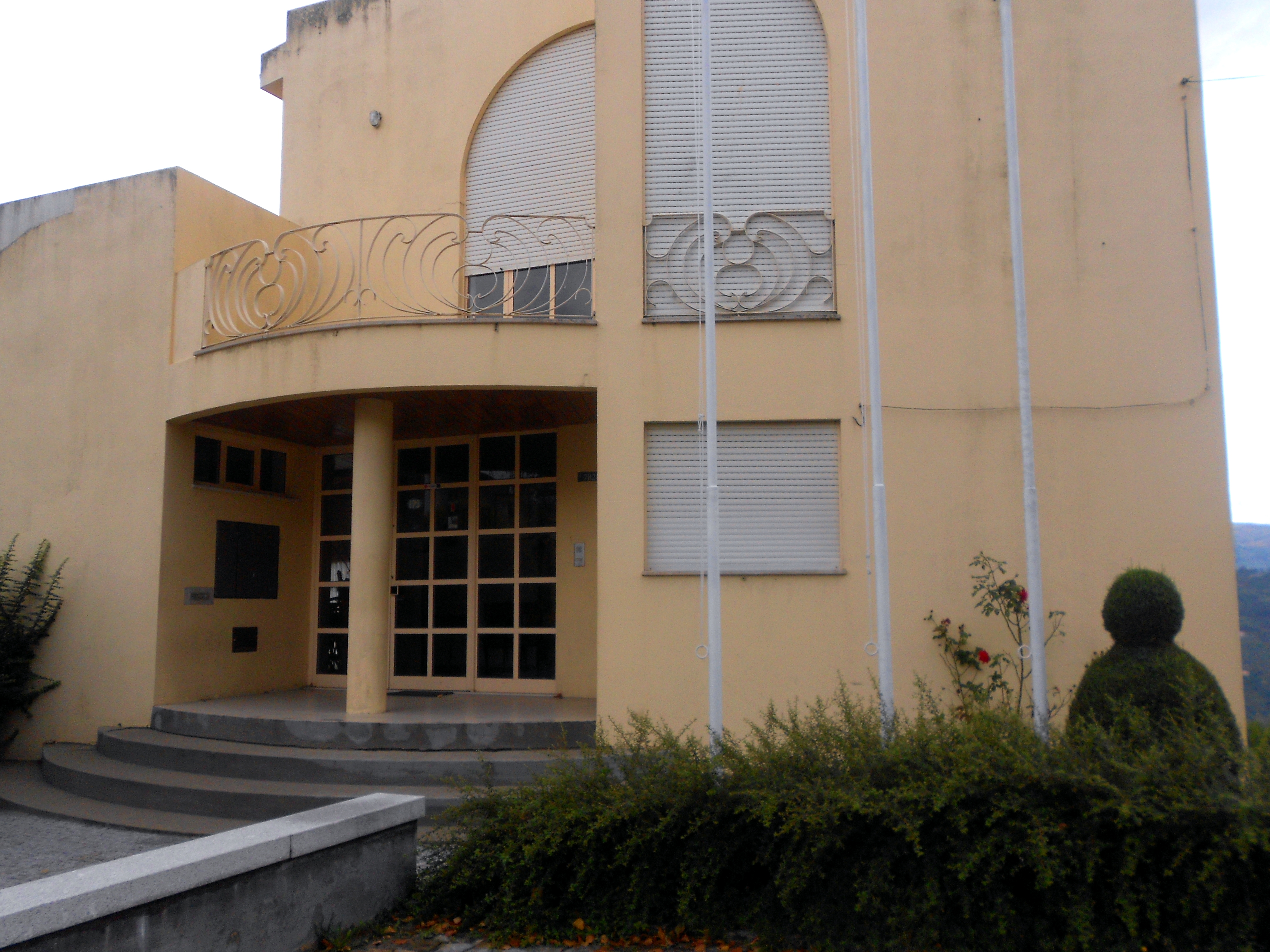 Sede da Banda Marcial de Ancede